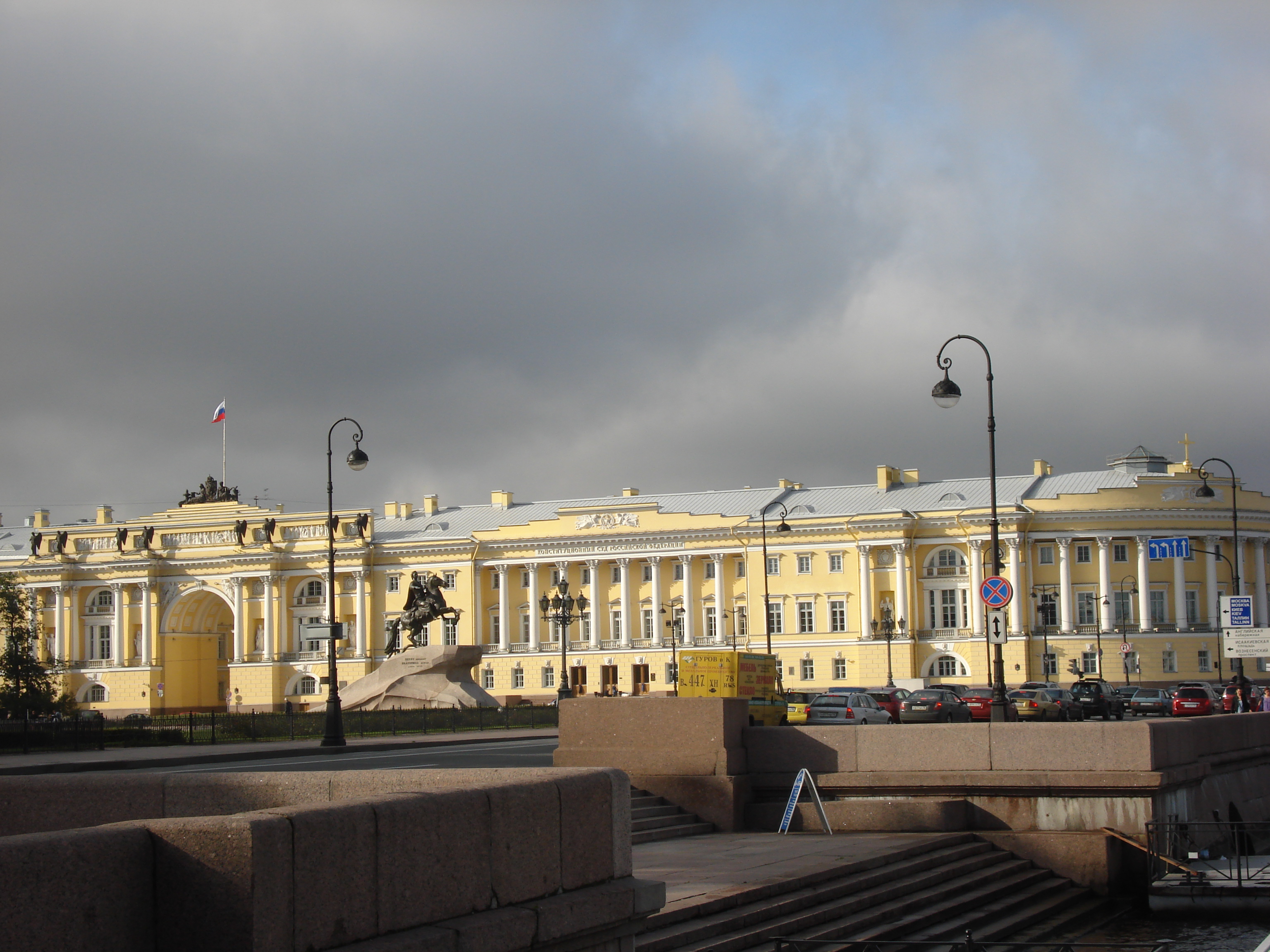 Сенат и Синод, Санкт-Петербург